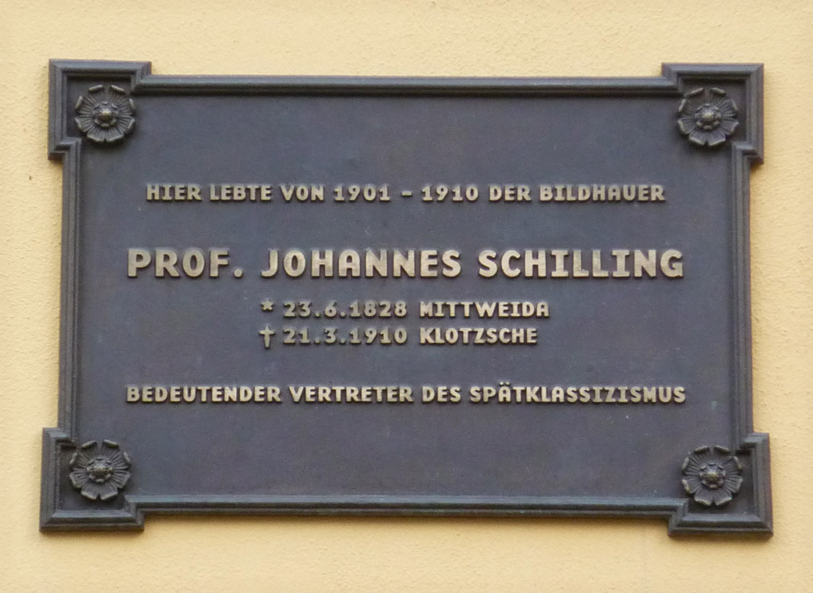 Gedenktafel am ehem. Wohnhaus von Johannes Schilling in Dresden-Klotzsche, Goethestr. 9